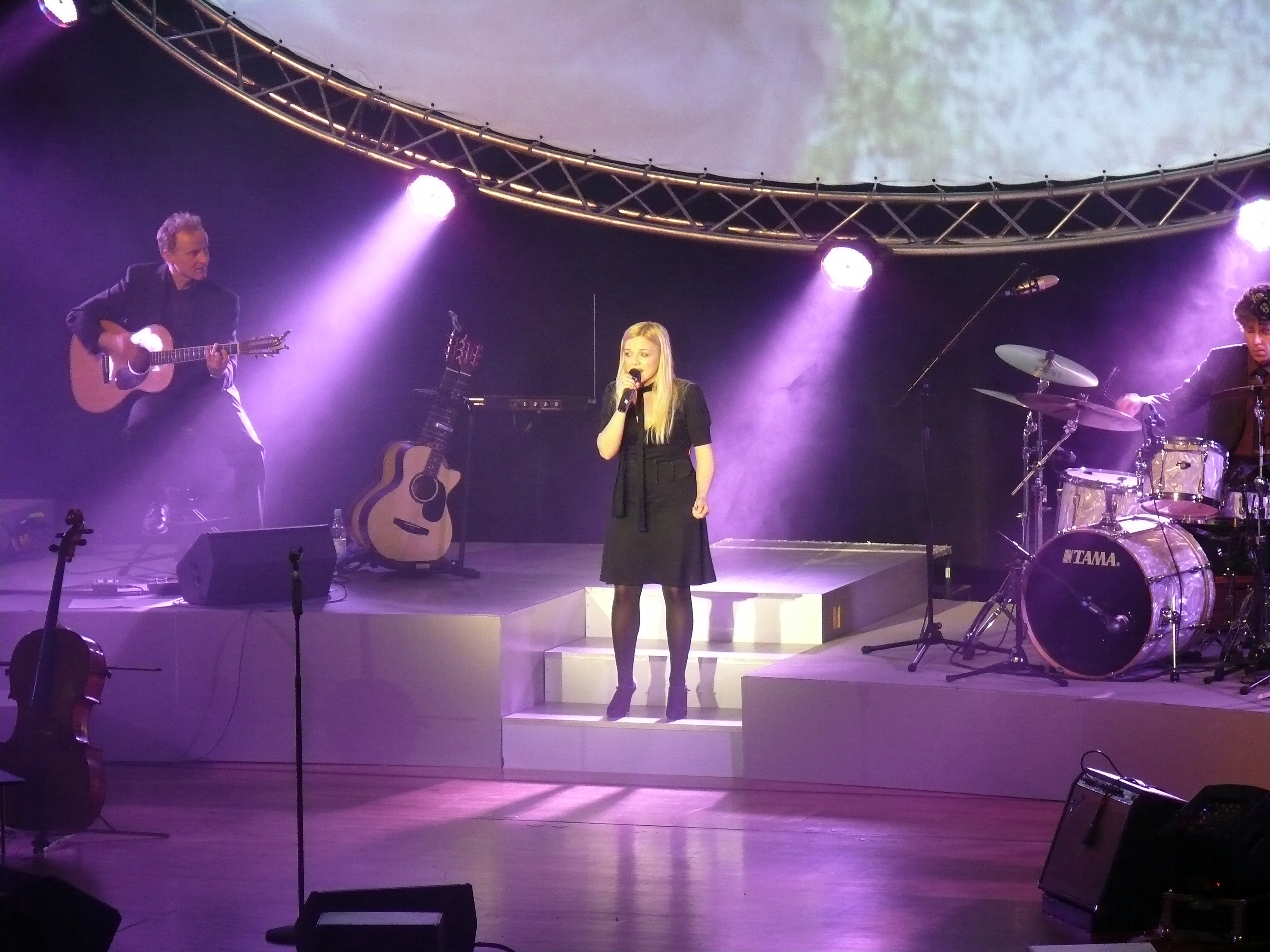 Annett Louisan am 20. Januar 2008 in der Liederhalle in Stuttgart